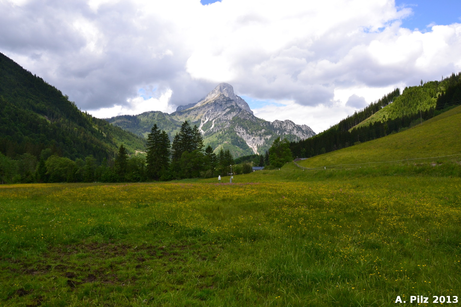 Kölblwiese 2013